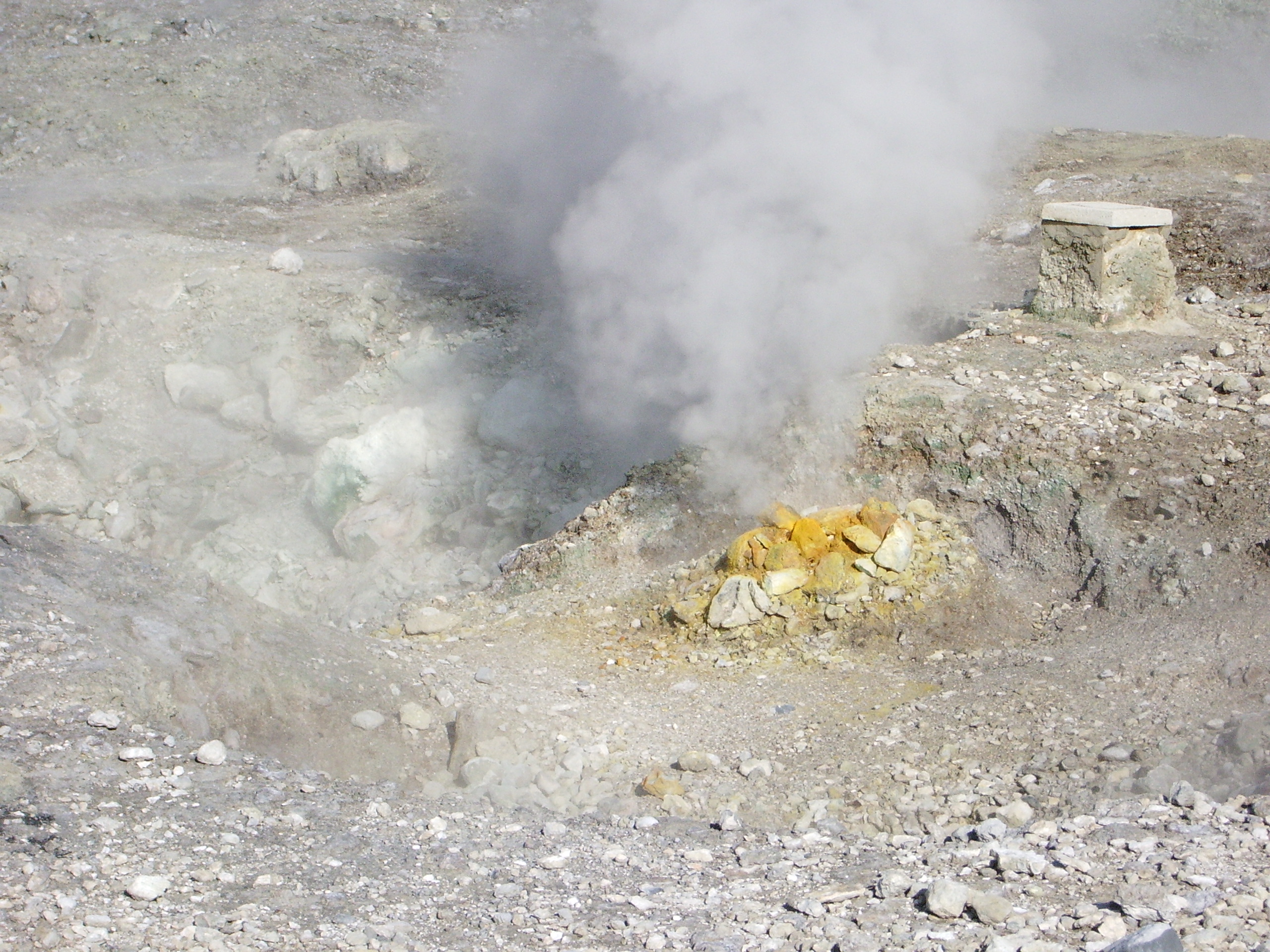 La Grande Bouche des Enfers Copyleft Je suis l'auteur de cette photo.